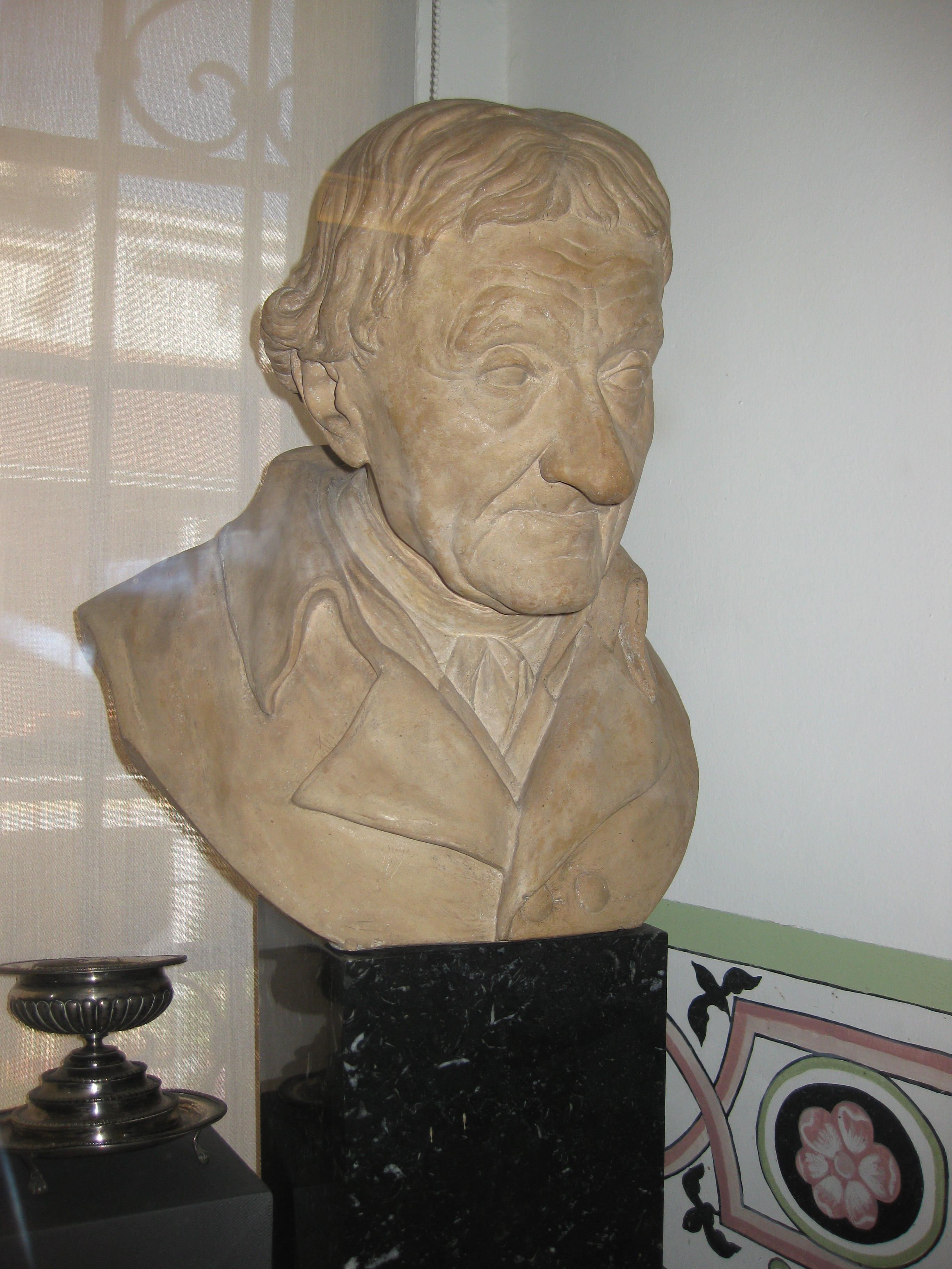 Busto del abate Juan Ignacio Molina ubicado en el Museo Histórico Nacional en Santiago de Chile.